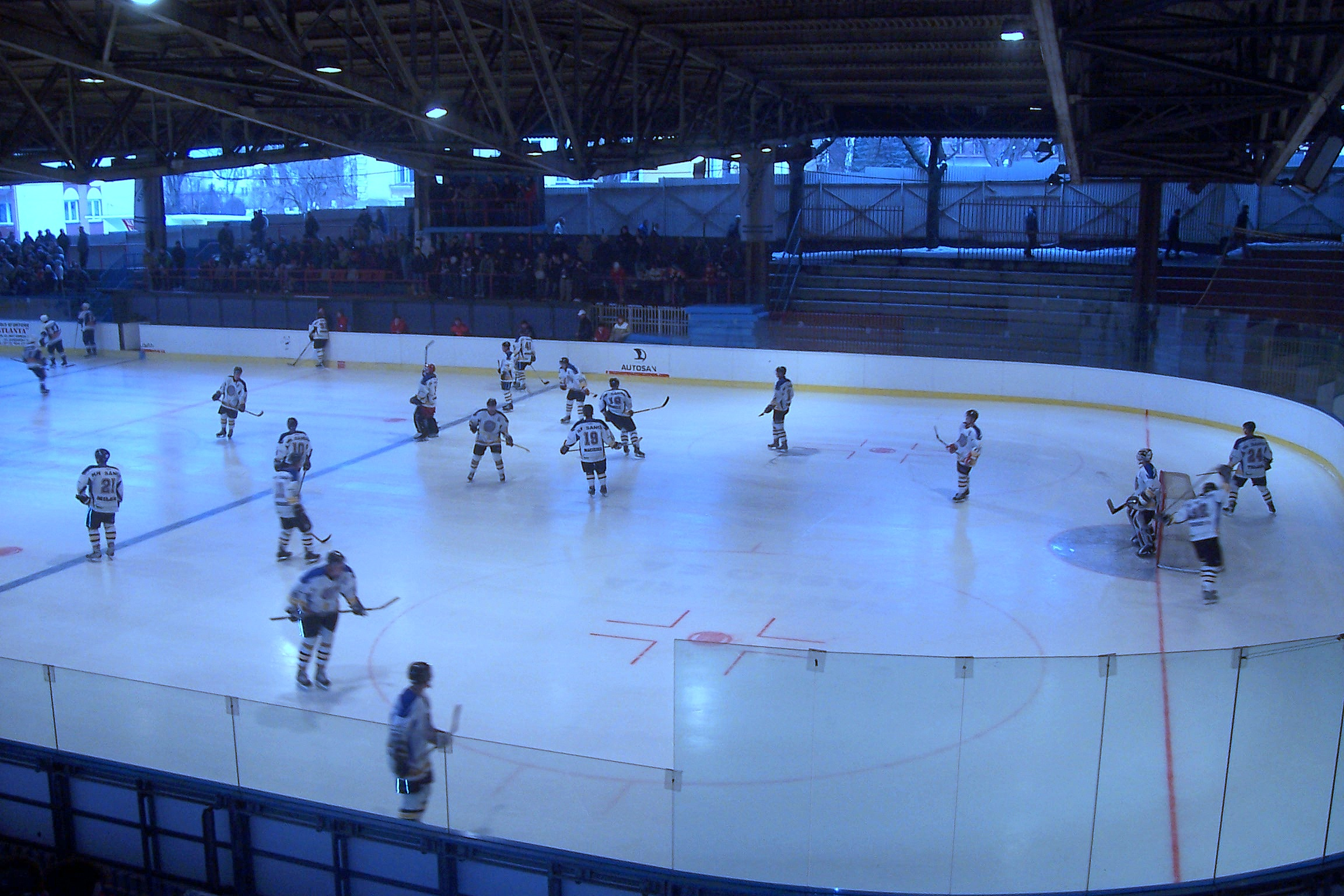 KH Sanok - Stoczniowcem Gdańsk (6:2) mecz 21 marca 2006 jako ostatnie oficjalne spotkanie hokeja na lodzie na lodowisku Torsan.